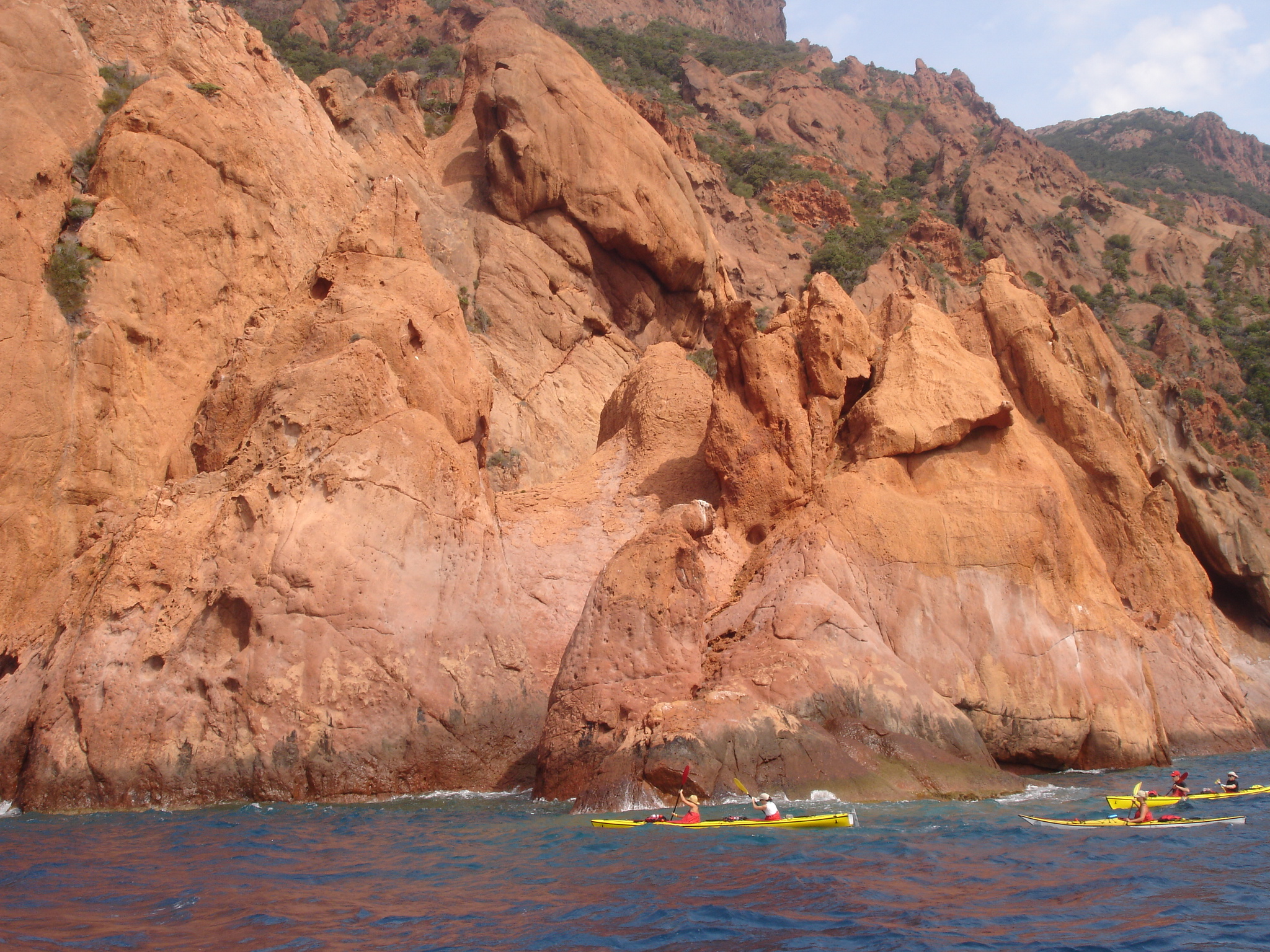 France, Corse-du-Sud (2A), Réserve de Scandola, canoês kayak